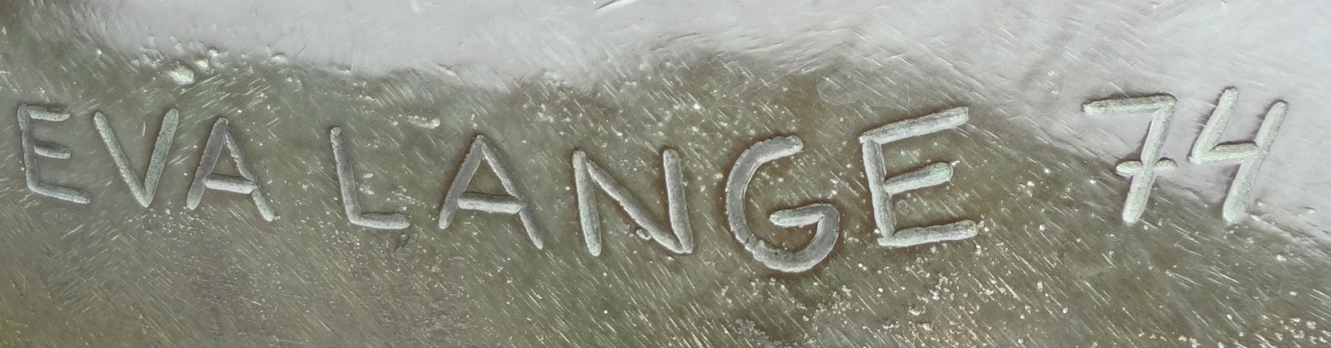 Eva Langes signatur på verket "Efter vinter kommer vår", placerad i Parken Zoo i Eskilstuna.